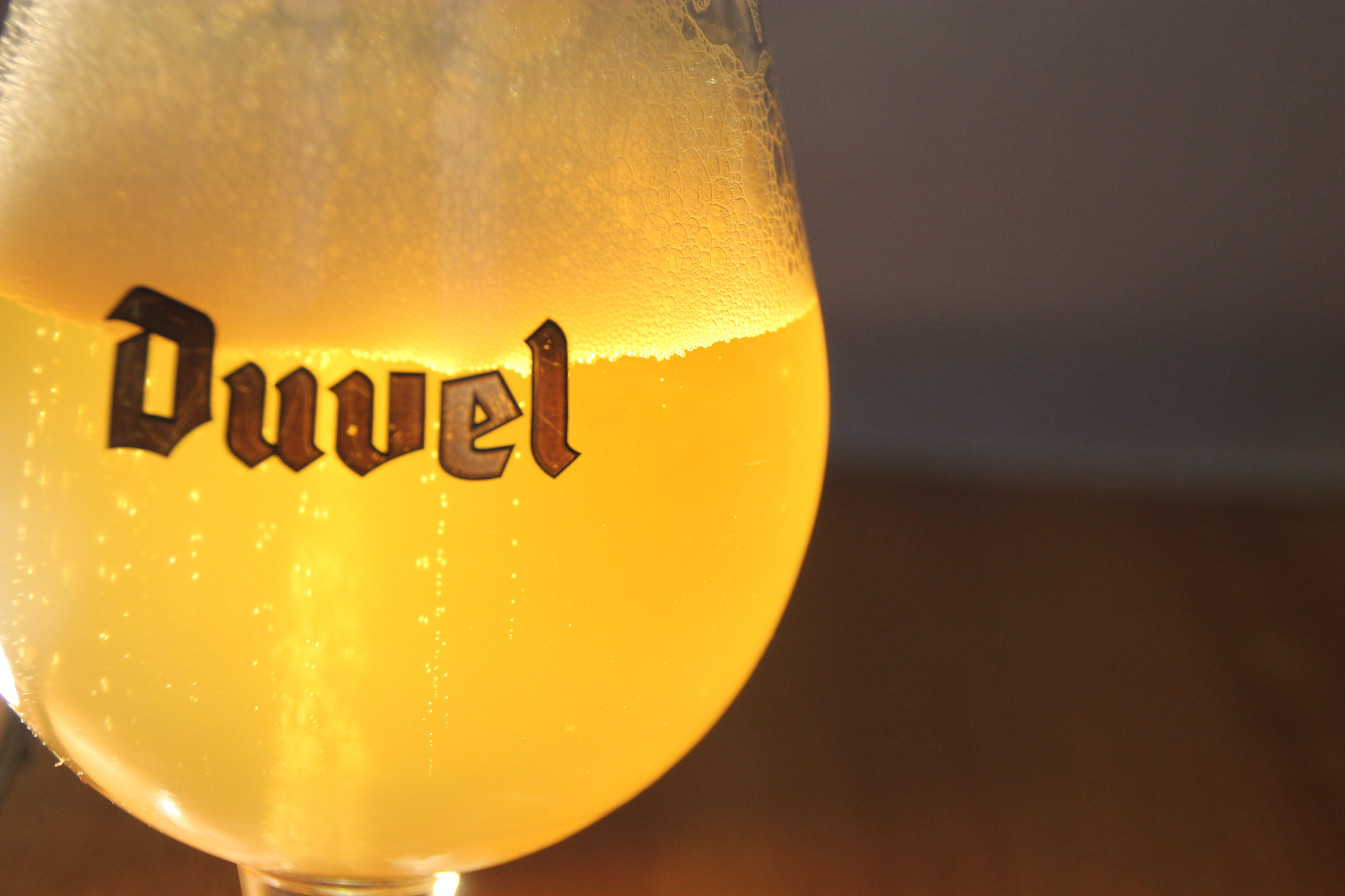 Foto in detail met kunstlicht